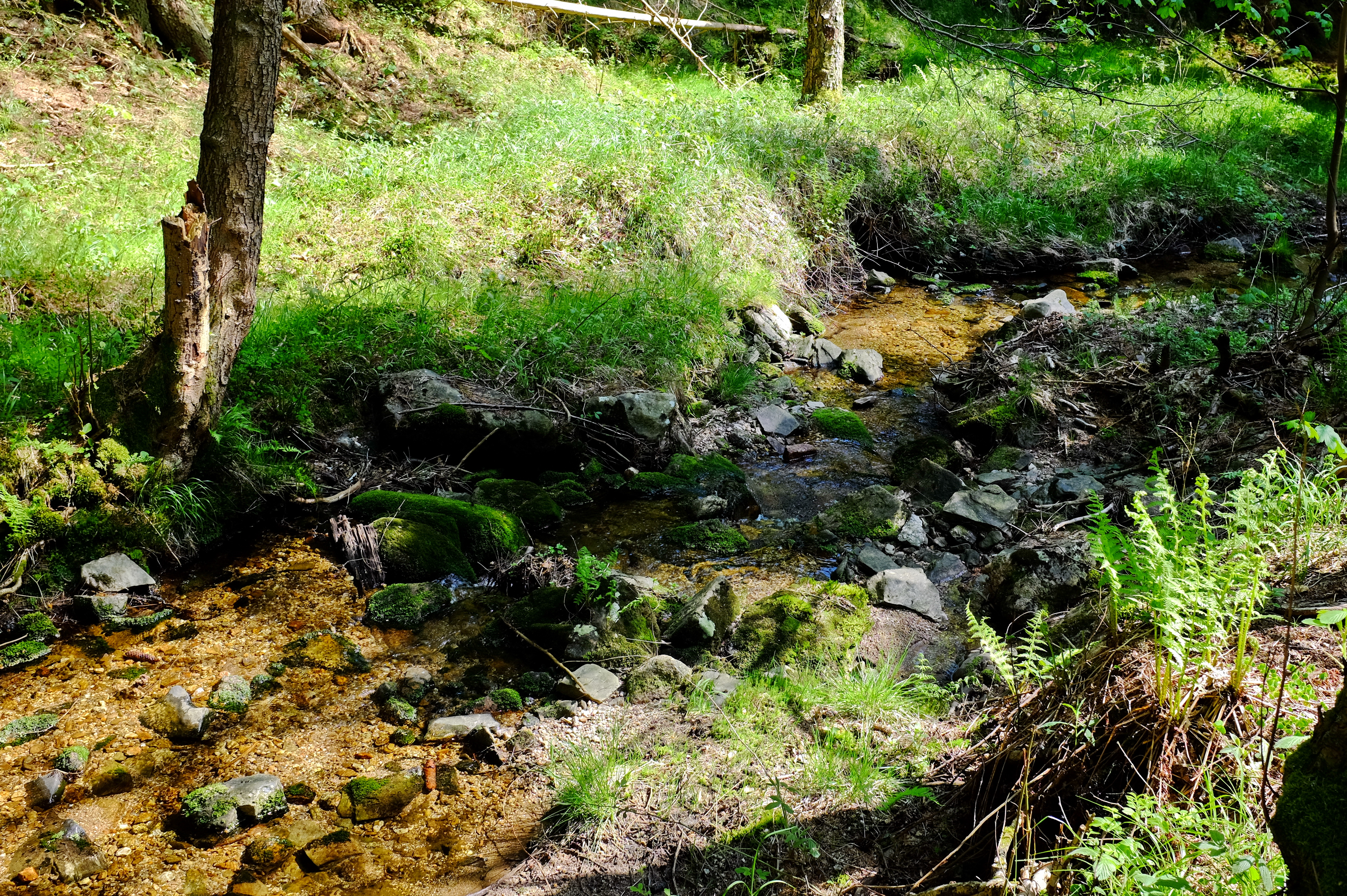 Potok Rybná, přítok Bílé Bystřice v Krušných horách, okres Karlovy Vary